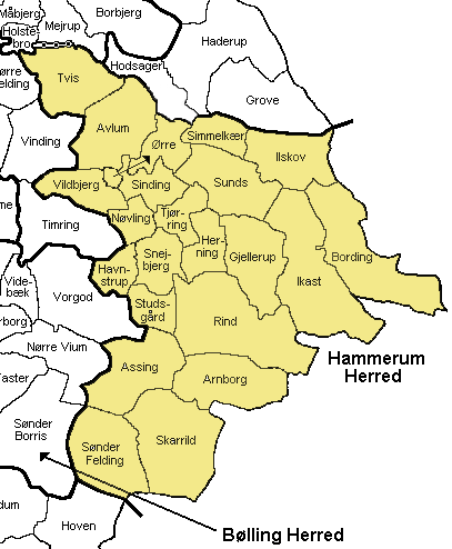 Hammerum Herred, Ringkøbing Amt, Denmark Map by Svend-Erik Christiansen , edited by Nico-dk.